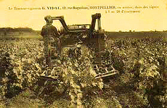 Tracteur vigneron Georges Vidal à chenilles